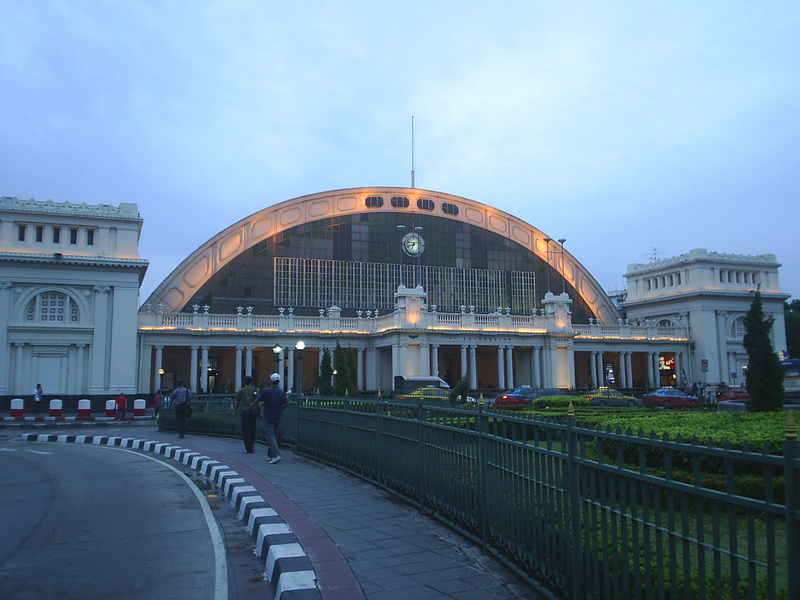 Hualanphong station in Bangkok, Thailand.